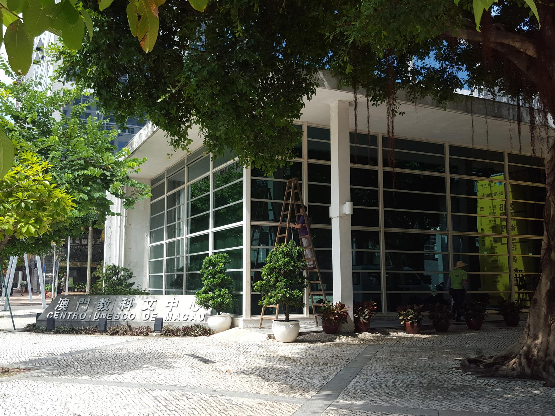 Centro UNESCO de Macau